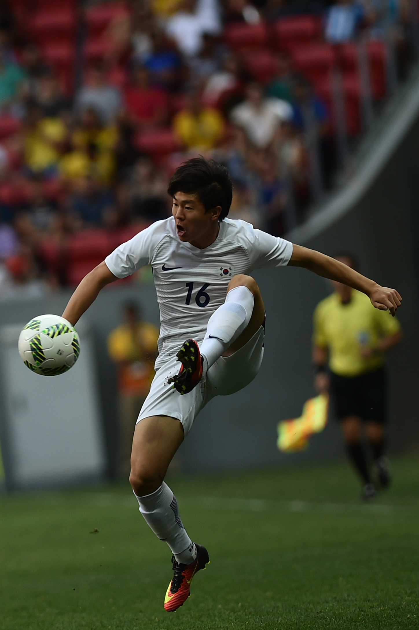 Estádio Nacional de Brasília Mané Garrincha, Brasília, DF, Brasil, 10/8/2016 Foto: Andre Borges/Agência Brasília Coréia do Sul e México jogam nesta quarta-feira (10), no Estádio Mané Garrincha, pelo grupo C do futebol masculino nas Olimpíadas 2016.